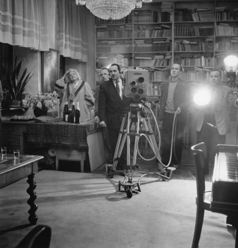 Fernsehübertragung im Freiligrath-Haus in Unkel am Rhein